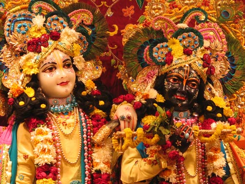 Krishna_Balarama ISKCON Vrindavan